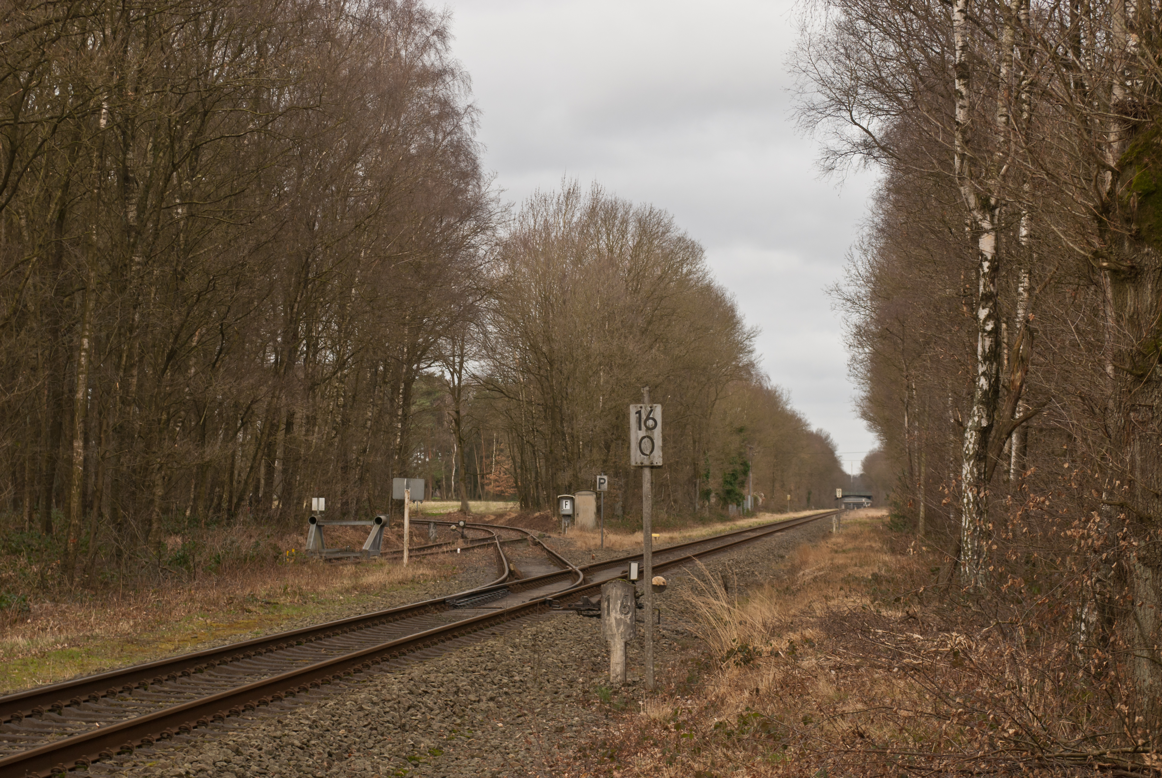 Die Ausweichanschlußstelle Klinkum am Eisernen Rhein (Bahnstrecke Rheydt - Dalheim), Blickrichtung Dalheim. Im Hintergrund links neben der Kilometertafel 16,2 durch Gebüsch verdeckt die ehemalige Blockstelle Klinkum.